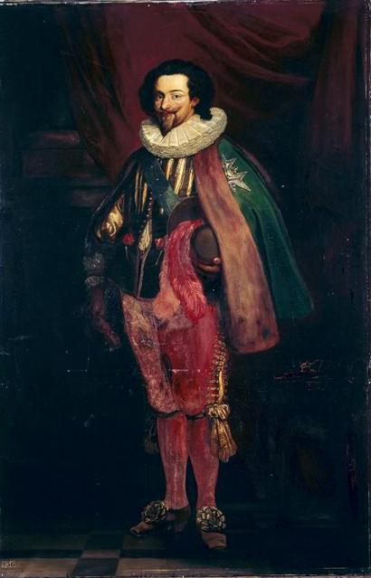 Copie d'après un original conservé au château de Dampierre ; commandé par Louis-Philippe pour le musée historique de Versailles en 1834